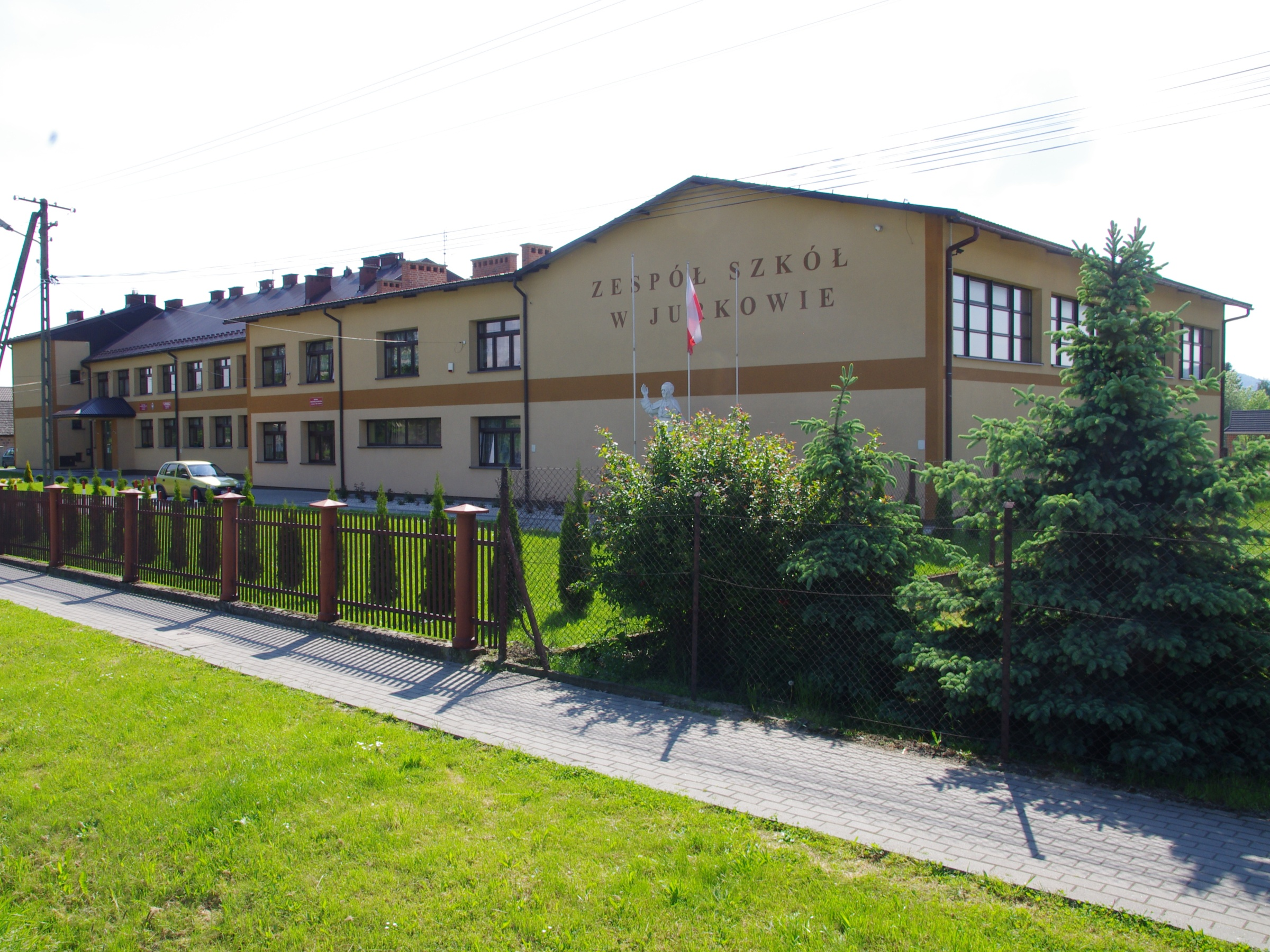 Zespół szkół w Jrkowie